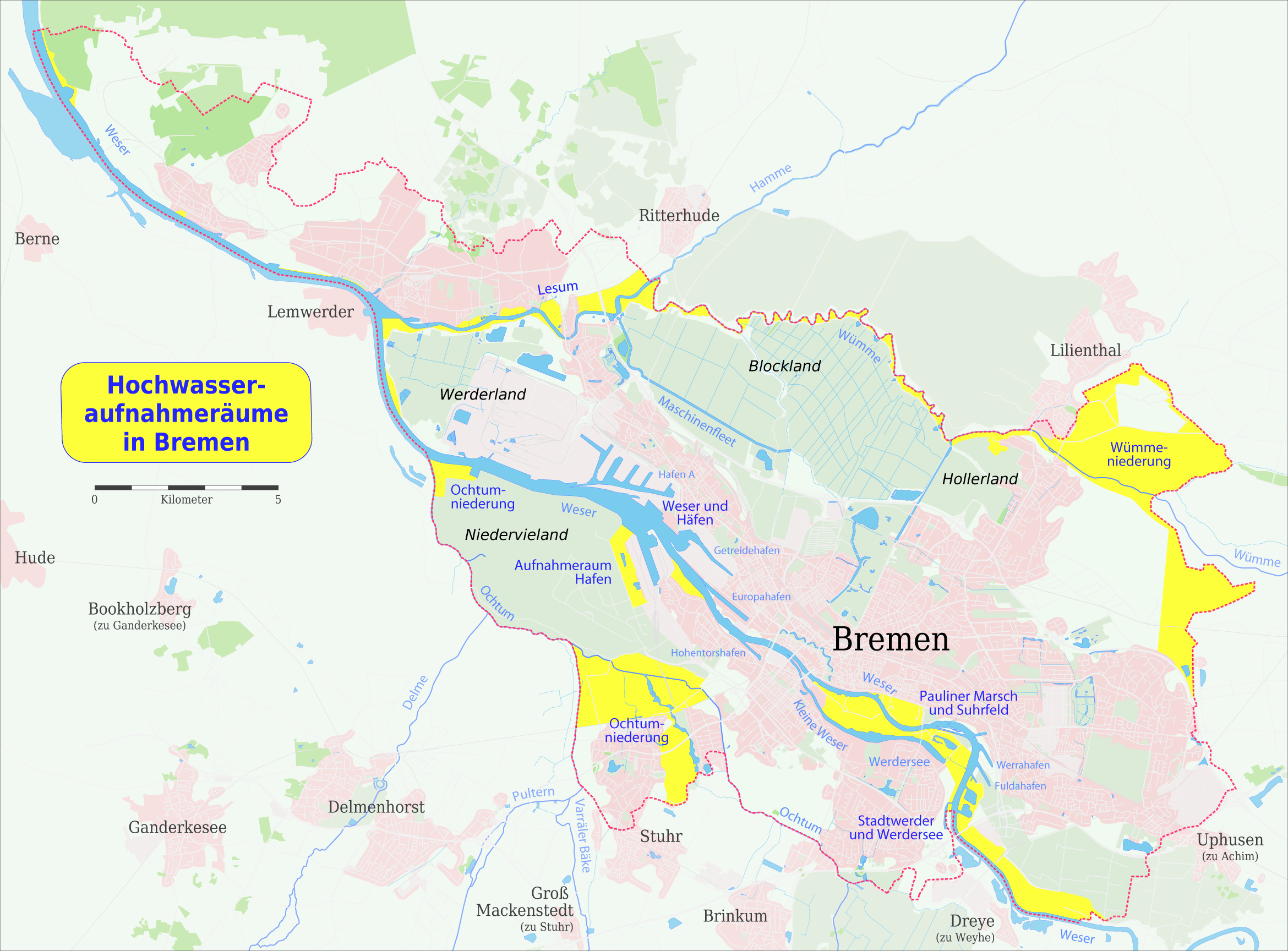 Karte der Hochwasseraufnahmeräume in Bremen